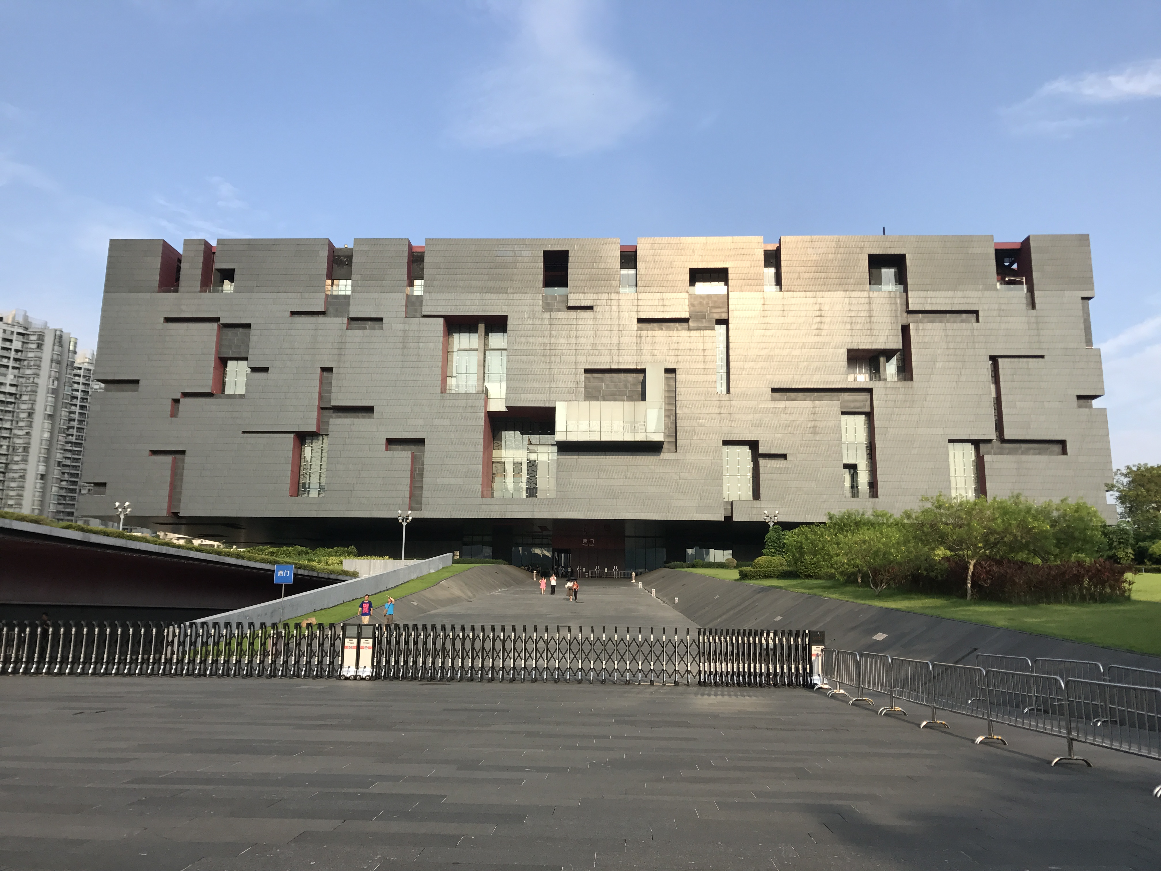 広東省博物館